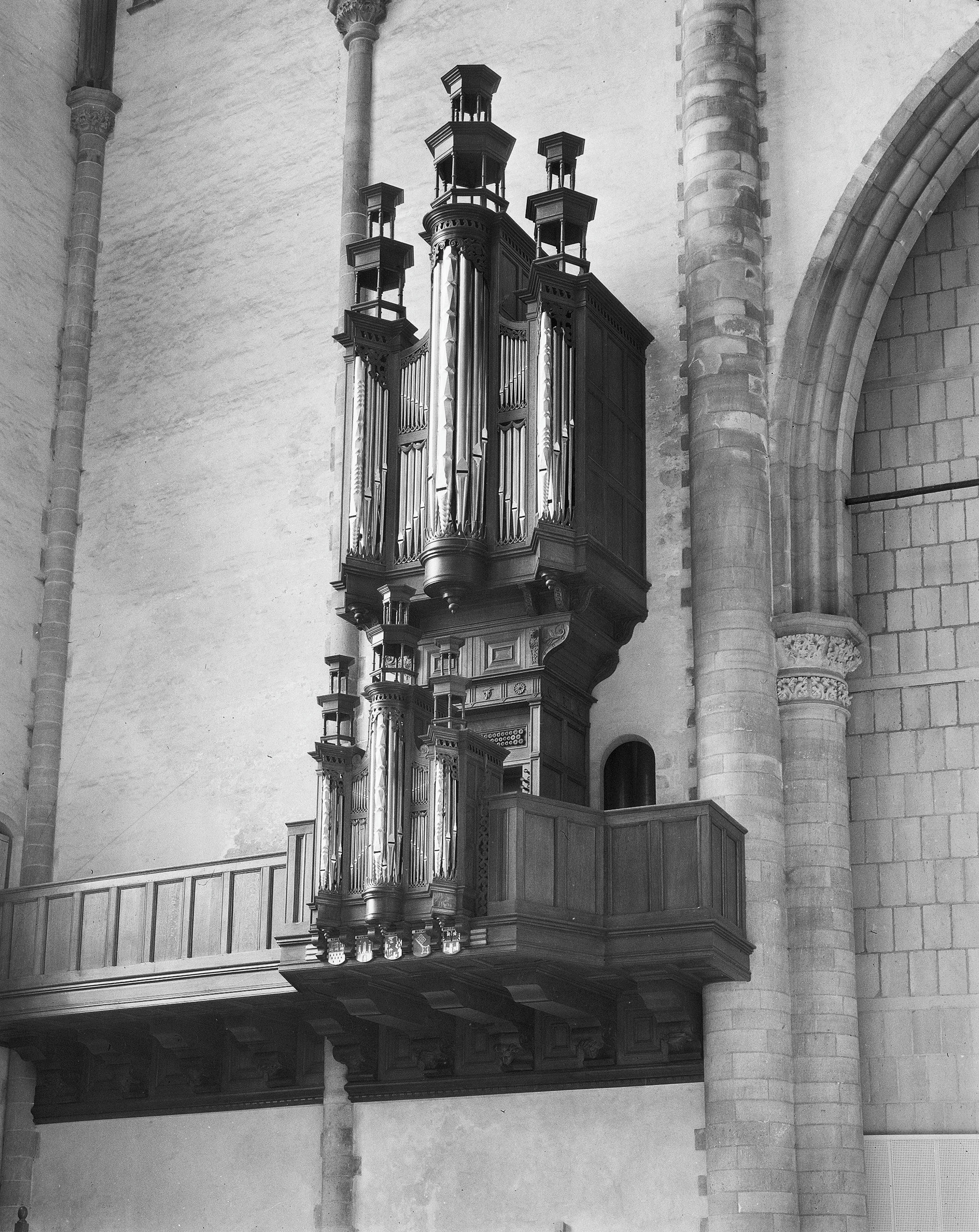 Grote- of Sint Laurenskerk: orgel